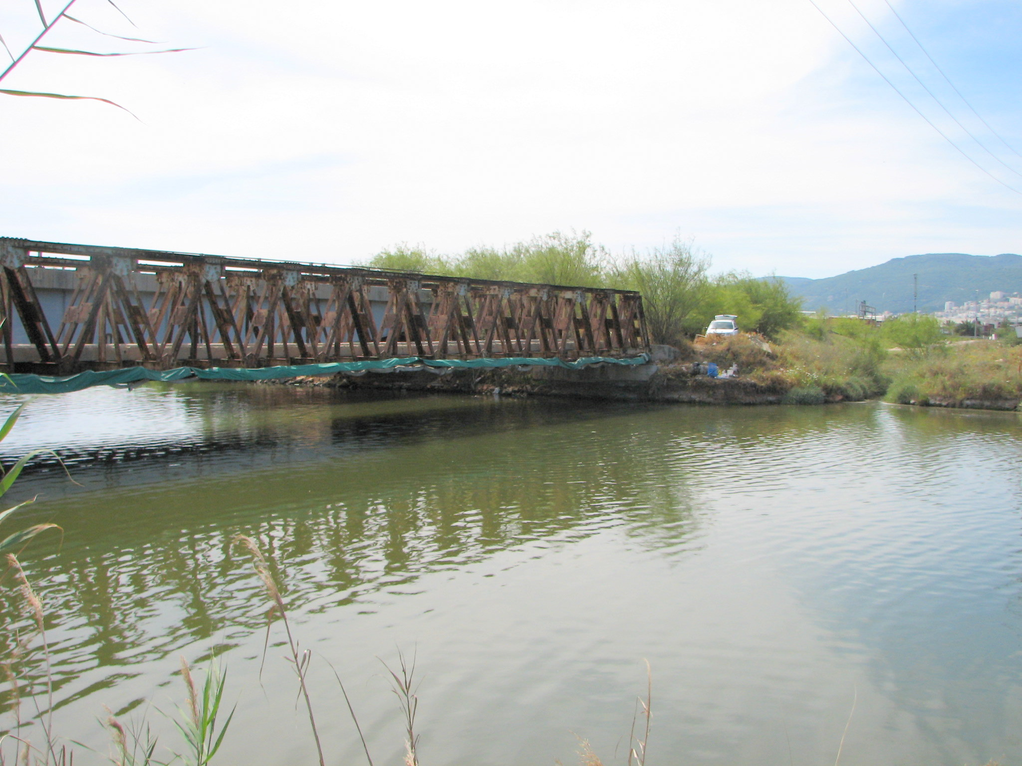 The Kishon River is a river in Israel that flows into the Mediterranean Sea at the city of Haifa.His length is 70 km. נחל קישון זורם מג'נין שבשומרון, לאורך כ-70 ק"מ, דרך עמק יזרעאל, מפער הקישון (המעבר הצר בין הכרמל לגבעות אלונים שפרעם) ועמק זבולון, עד יציאתו לים במפרץ חיפה. בשפך הנחל נמצא נמל הקישון. שטח אגן הניקוז שלו הוא השני בגודלו מבין נחלי החוף, כ-1,110 קמ"ר ולאורך חלק ניכר מאפיקו זרימתו איתנה. הנחל סבל מזיהום רב במיוחד באפיקו התחתון. בתחילת שנות ה2000 עבר הנחל שיקום באמצעות רשות נחל קישון והדגה והעופות חזרו לנחל פארק הקישון הגשר הישן